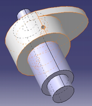 Exzenter auf Welle